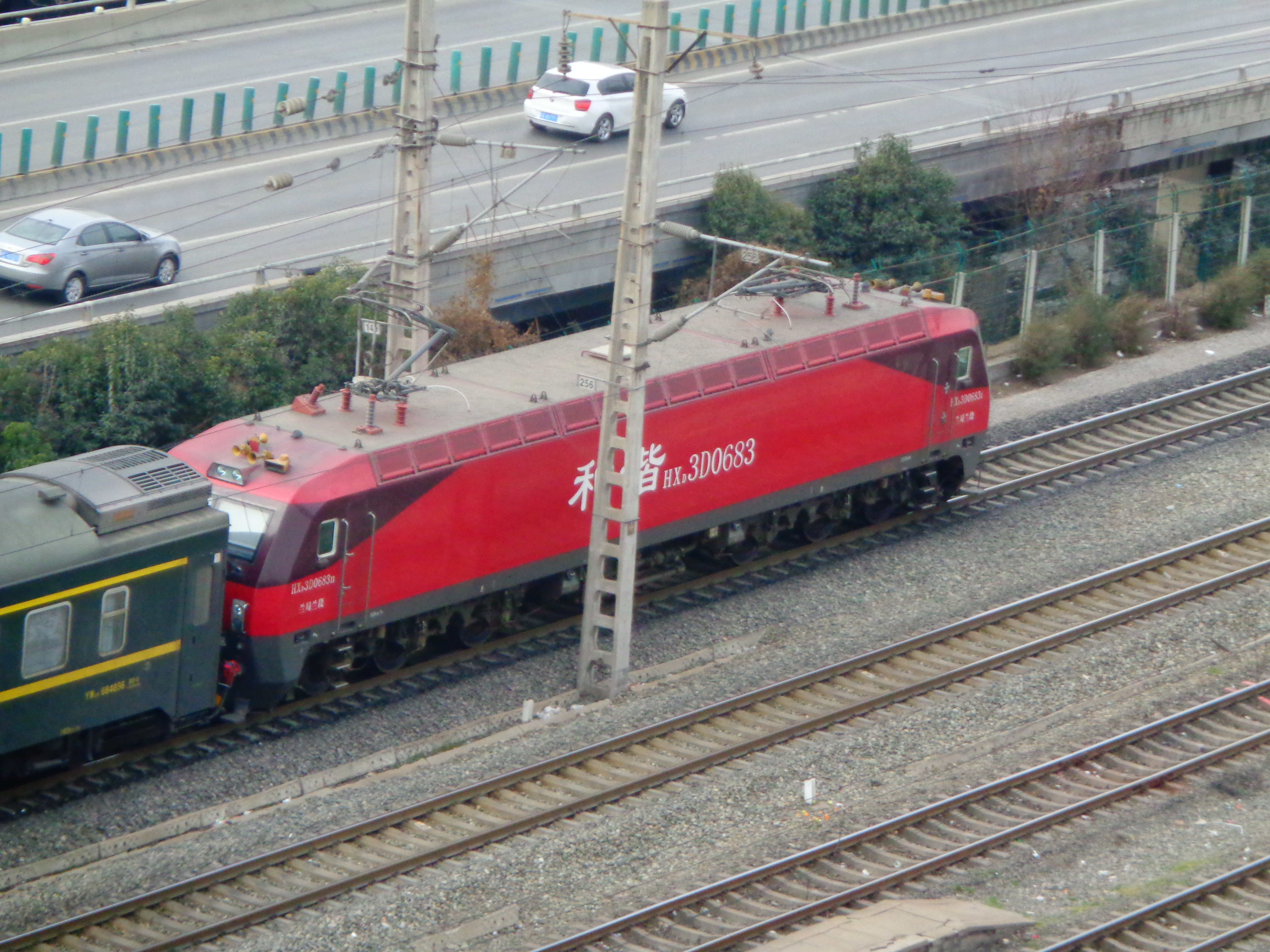 西安市新城区安远门前的陇海铁路，车来车往，有从正线进站或出站的，也有停在侧线上的车皮，也有两辆往来的东风调机单机通过或牵引车皮进出站。